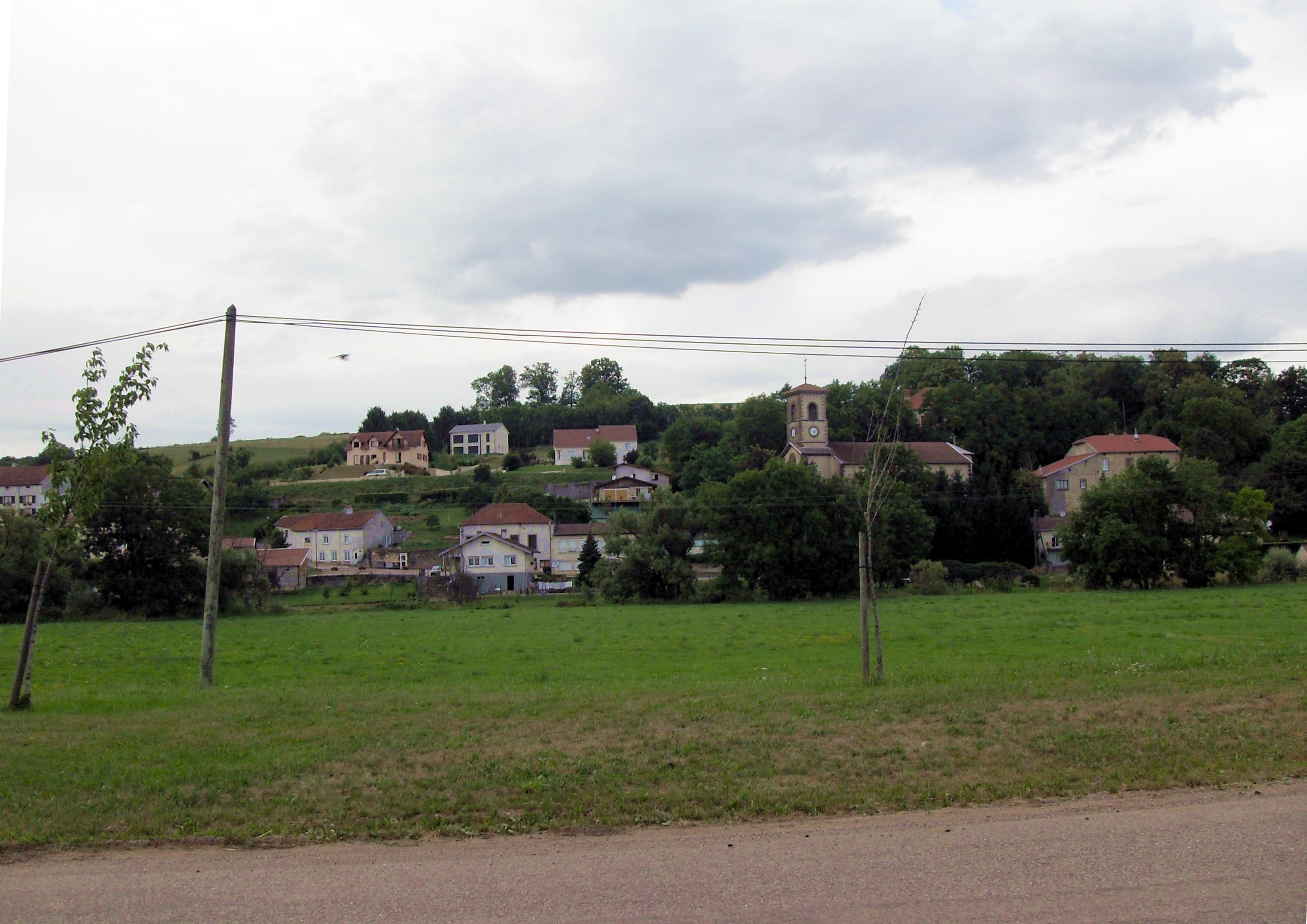 Vue sur le Madon à Ambacourt